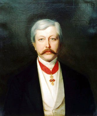 Herzog Engelbert-August von Arenbergtitle QS:P1476,de:"Herzog Engelbert-August von Arenberg"